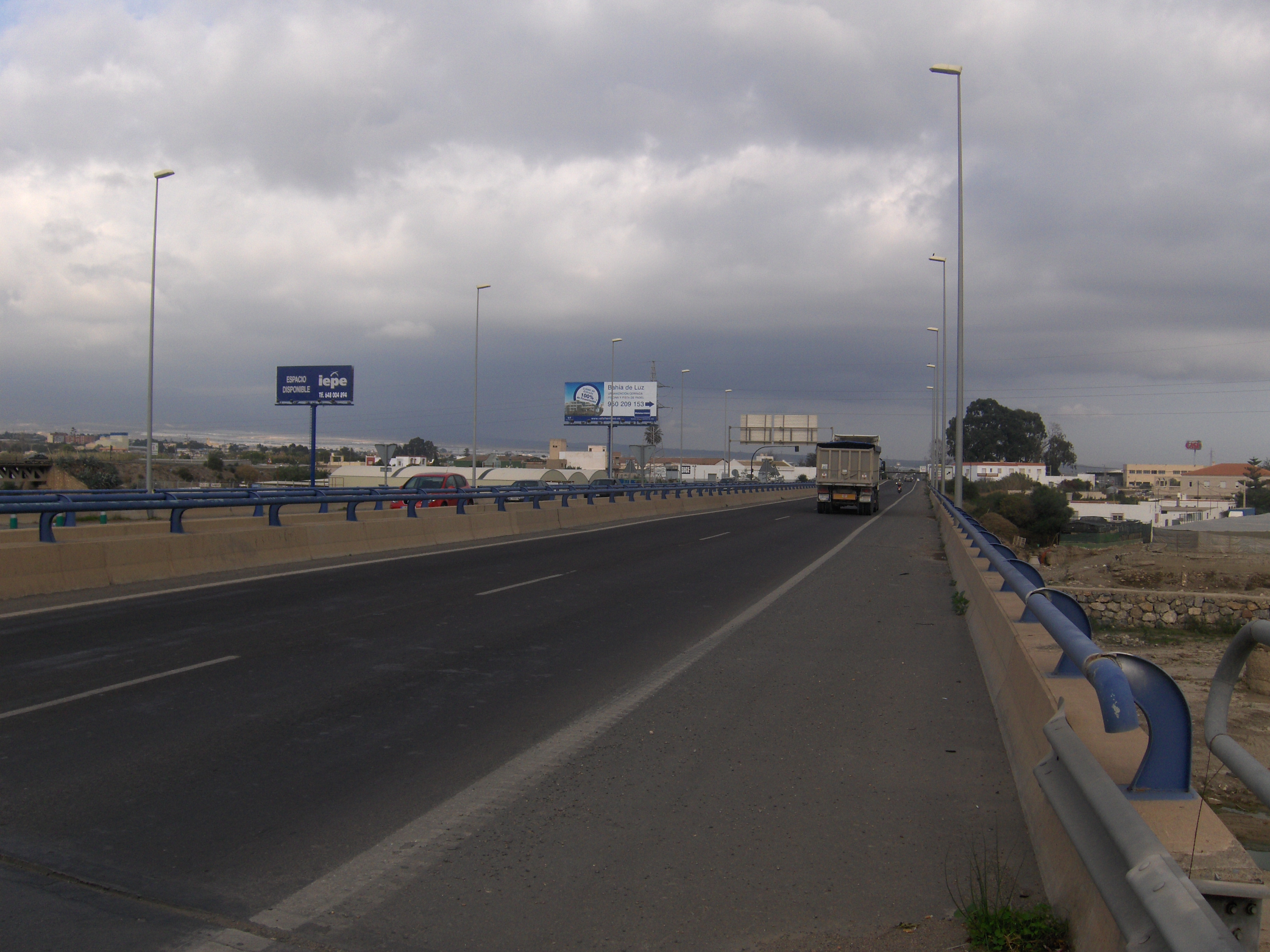 Comienzo de la autovía AL-12